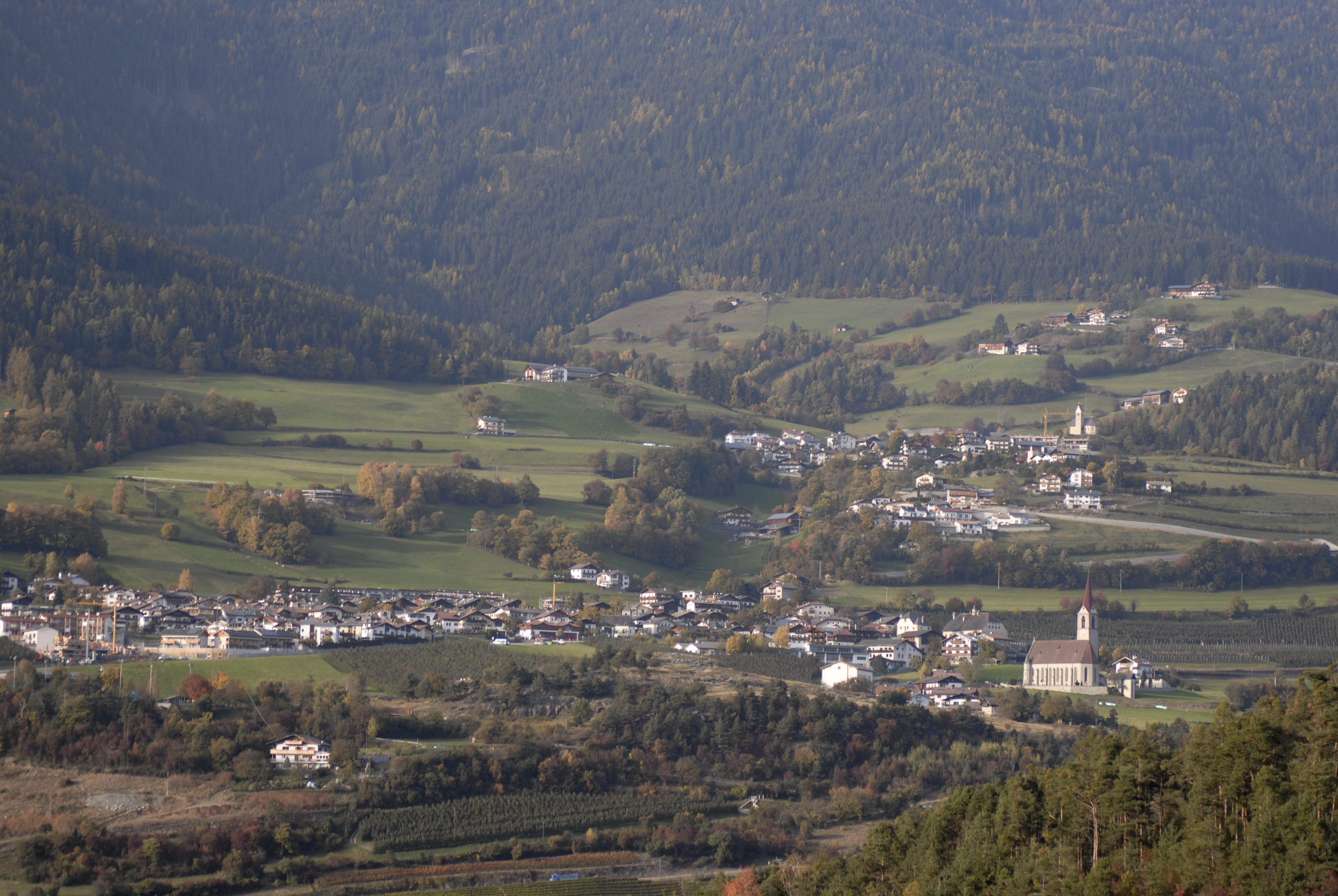 Feldthurns (Velturno) von Gufidaun aus gesehen